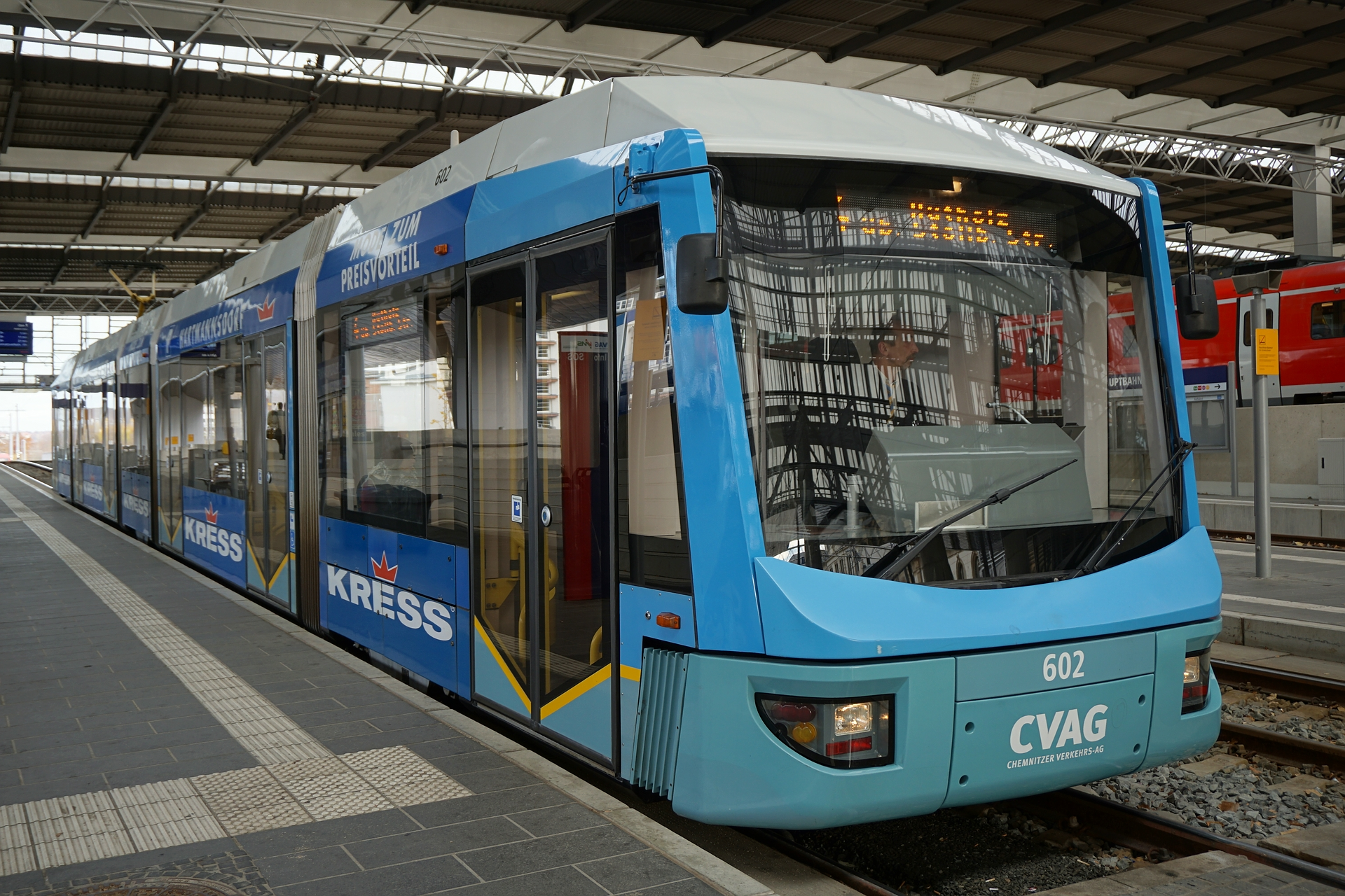 Variobahn 6NGT-LDE im Chemnitzer Hauptbahnhof